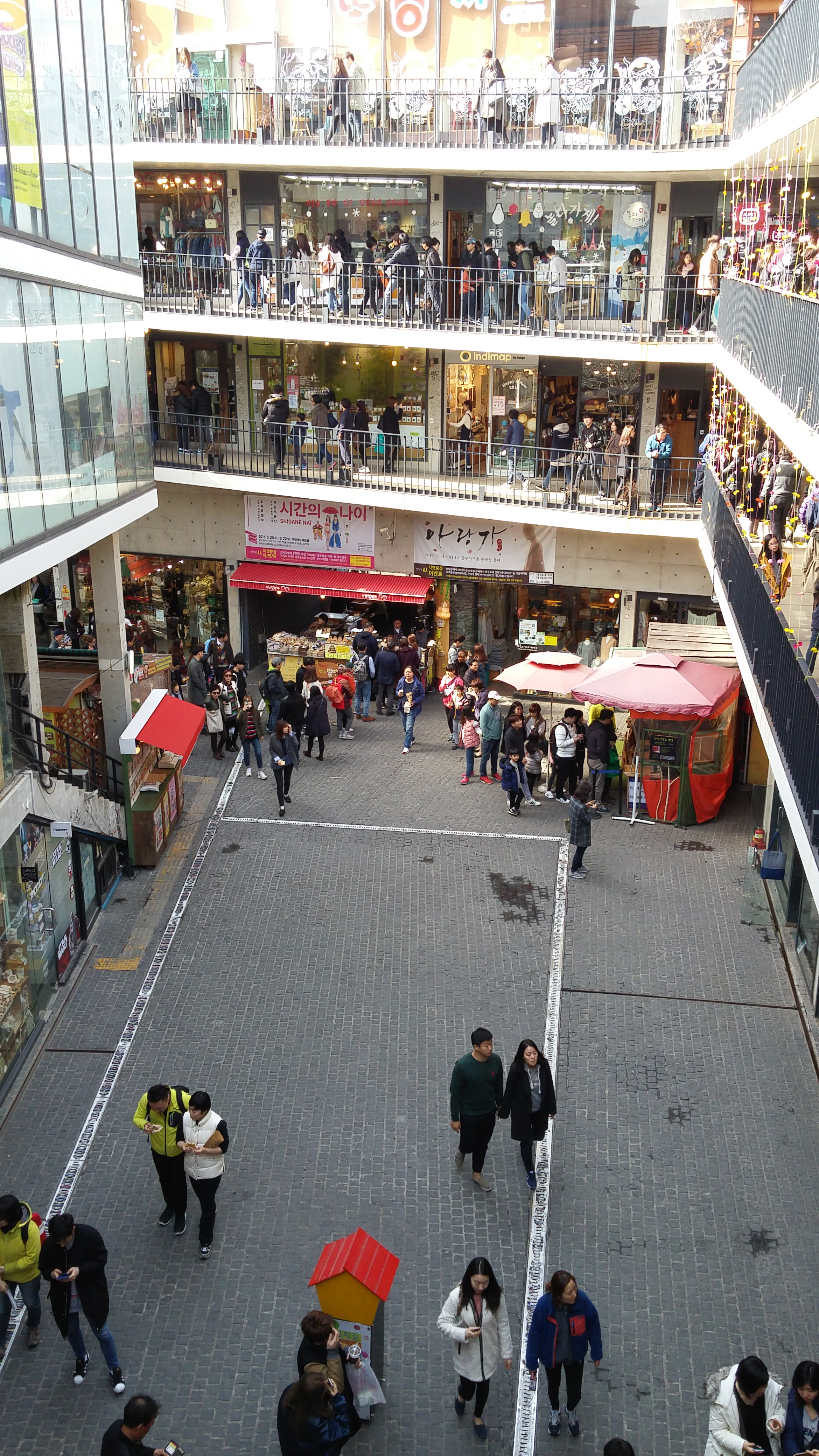 Ssamzigil in Insadong, Seoul.